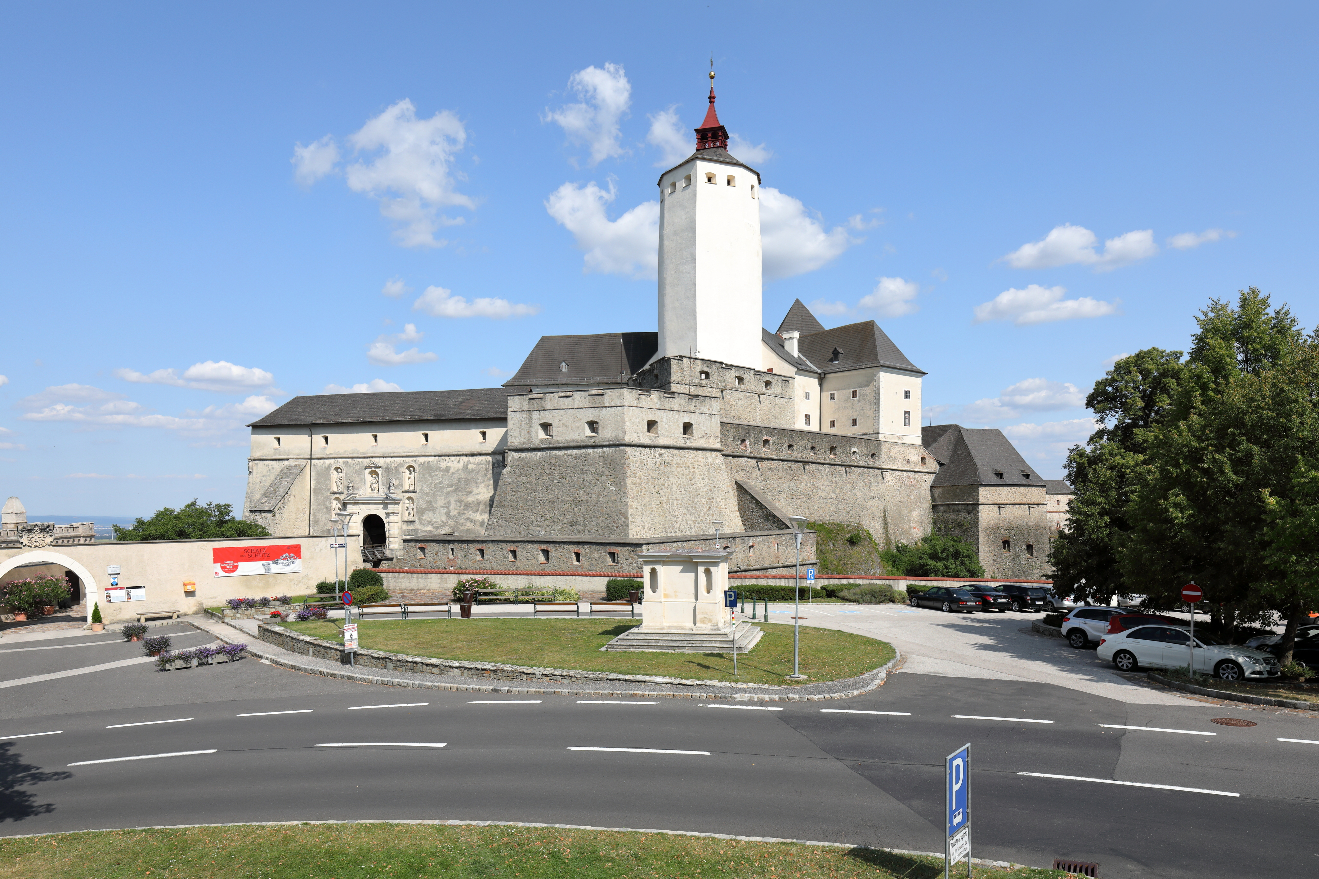 Westansicht der Burg Forchtenstein in Neustift an der Rosalia, ein Ortsteil der burgenländischen Gemeinde Forchtenstein.Die Burg befindet sich auf einem steilen Dolomitfelsen am Ostabhang des Rosaliengebirges und sicherte die Straßenverbindung Wr. Neustadt - Ödenburg (heutiges Sopron). Sie wurde ab dem 14. Jahrhundert von den Grafen von Mattersdorf errichtet. Nachdem die Burg 1626 in den Besitz der Esterházy gelangte, wurde sie im 17. Jahrhundert umfangreich um- und ausgebaut.